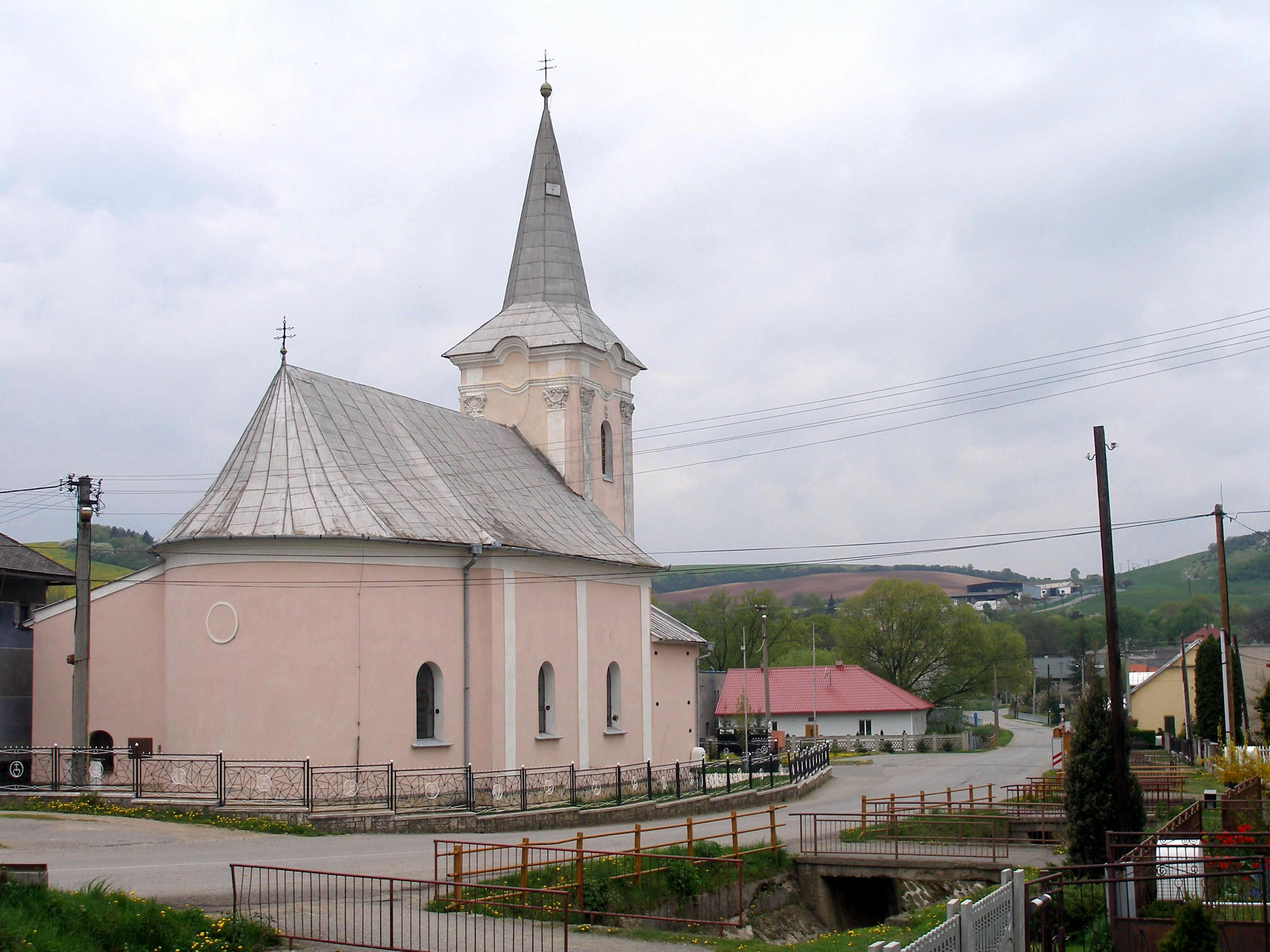 Obec Demjata okres Prešov región Šariš This medium shows the protected monument with the number 707-11127/0 (other) in the Slovak Republic.